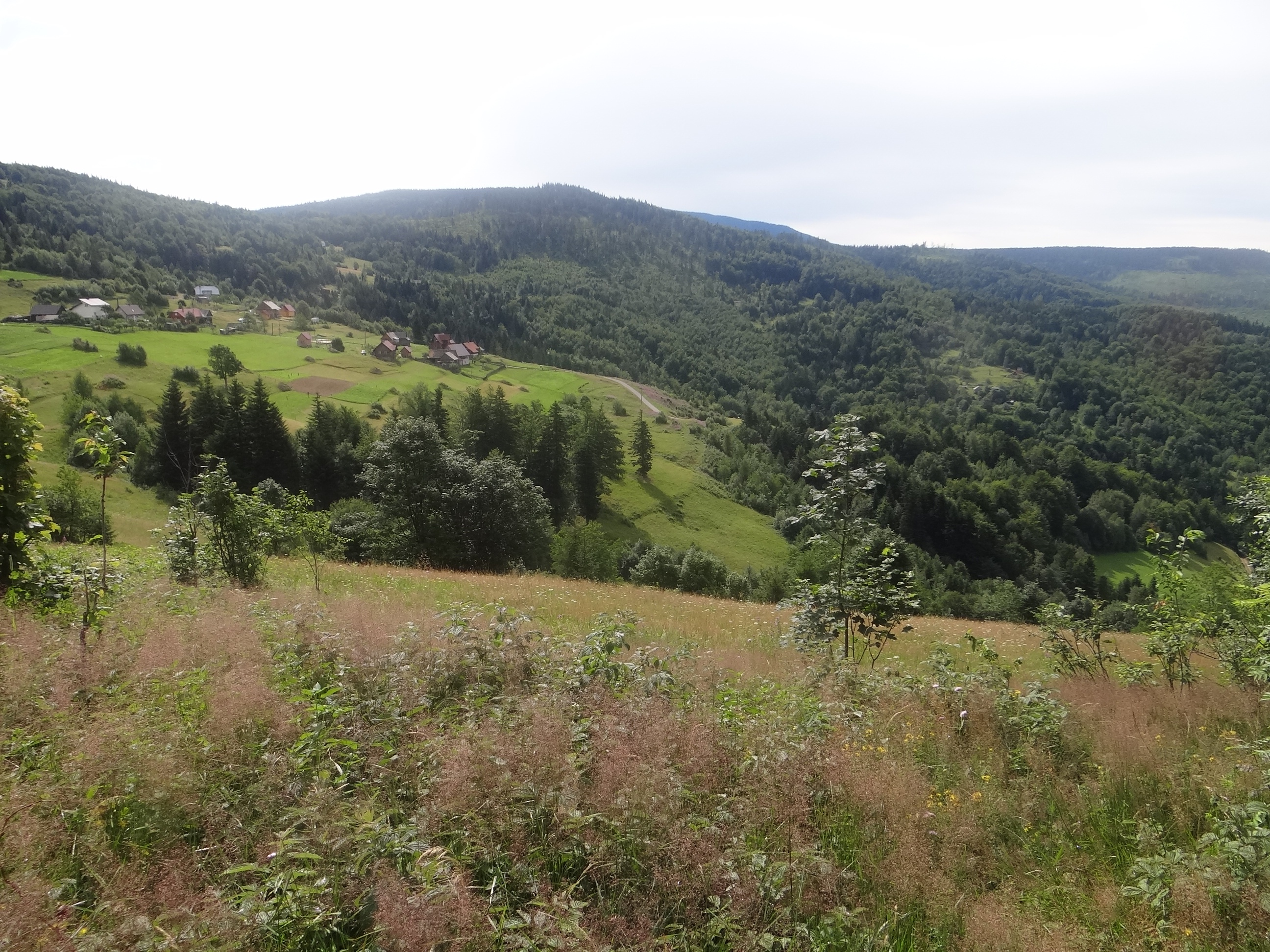 Osiedle Moczurki w Przyborowie i widok na Jaworzynę